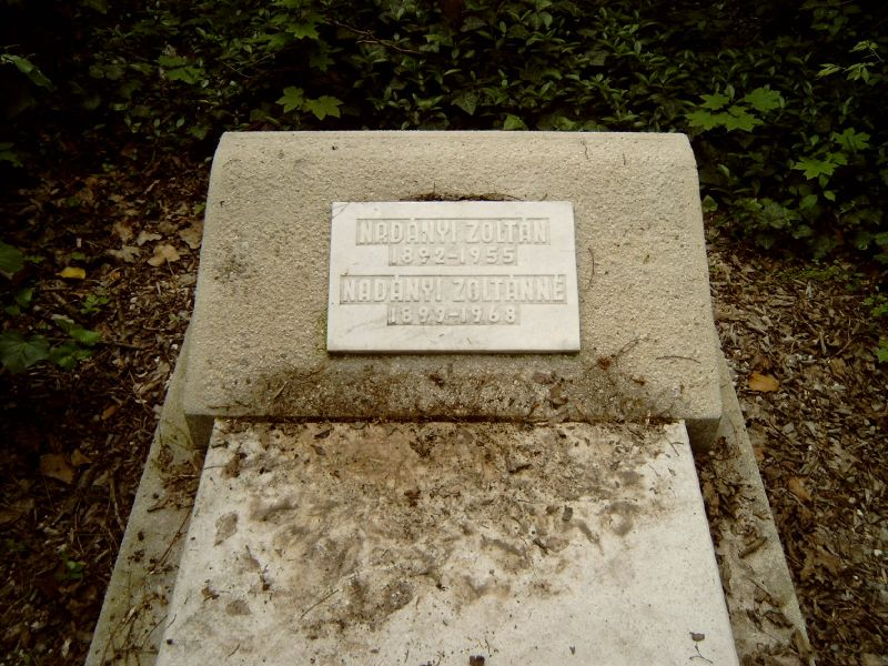 Nadányi Zoltán (Feketegyörös, 1892. okt. 9. – Bp., 1955. febr. 2.): költő és műfordító sírja Budapesten. Új köztemető: 139/3-1-40.